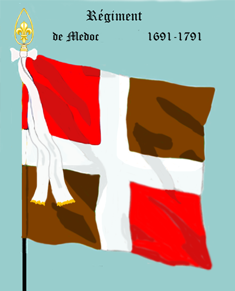 Ordonnanzfahne eines königlich französischen Infanterie-Regiments. - Entnommen und überarbeitet aus: „LES UNIFORMES ET LES DRAPEAUX DE L'ARMÉE DU ROI“ Marseille 1899. (Drapeau d'ordonnance d' un régiment française d'infanterie royale.)